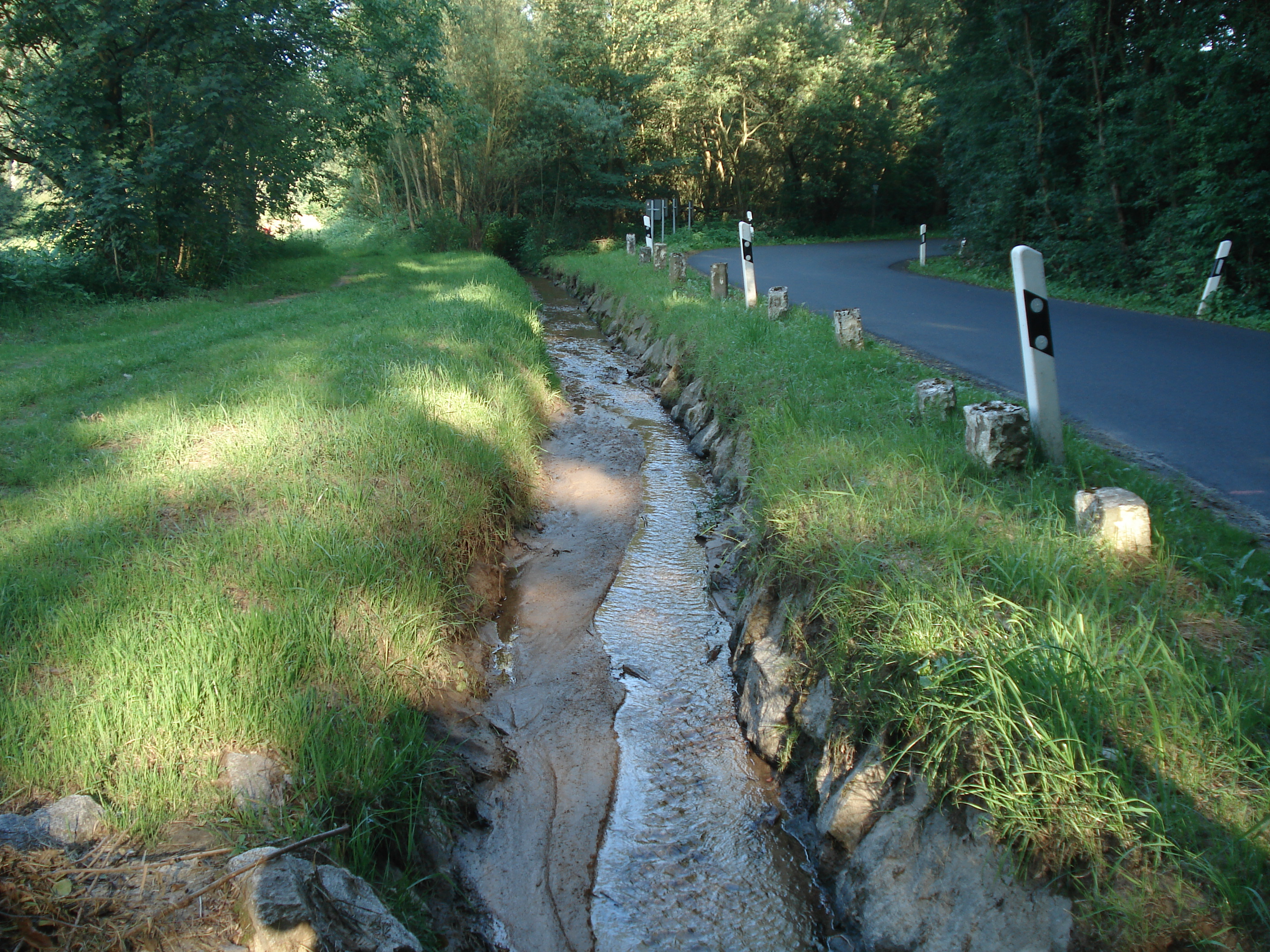 Der Röderbach vor Aschaffenburg